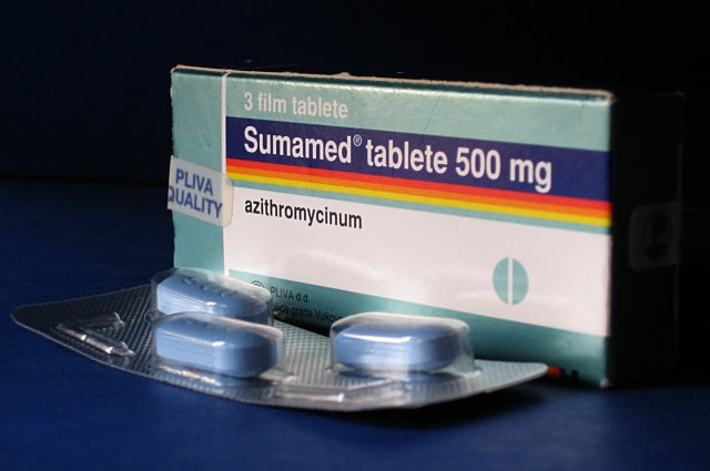 Fotografija lijeka Sumamed